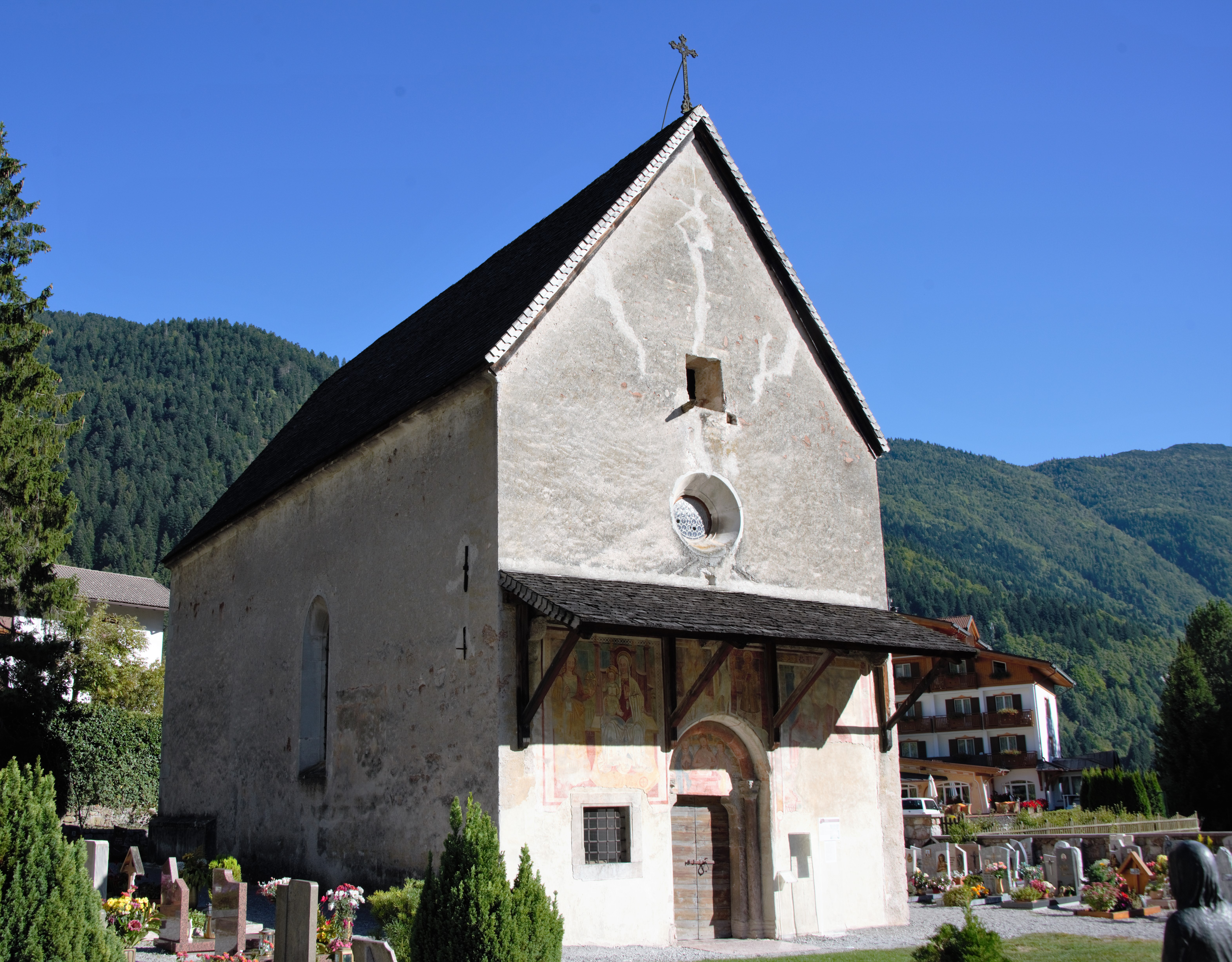 chiesa di San Vigilio, al centro del cimitero del Paese. This is a photo of a monument which is part of cultural heritage of Italy.